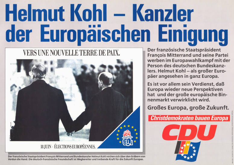 Helmut Kohl - Kanzler der Europäischen Einigung Der französische Staatspräsident Francois Mitterand und seine Partei werben im Europawahlkampf mit der Person des deutschen Bundeskanzlers Helmut Kohl - als großer Europäer angesehen in ganz Europa. Es ist vor allem sein Verdienst, daß Europa wieder neue Perspektiven hat und der große europäische Binnenmarkt verwirklicht wird Großes Europa, große Zukunft. Christdemokraten bauen Europa CDU ...Abbildung:Kohl und Mitterand reichen sich über den Gräbern von Verdun die Hand (Foto)Kommentar:Vgl. Plakat Nr. 10-030-450Plakatart:Kandidaten-/Personenplakat mit PorträtKünstler_Grafiker:Photo: A.F.P.Auftraggeber:CDU-Bundesgeschäftsstelle, Abt. Öffentlichkeitsarbeit, Konrad-Adenauer-Haus, BonnObjekt-Signatur:10-030 : 226Bestand:Europawahlplakate (10-030)GliederungBestand10-18:Europawahlplakate (10-030) » CDULizenz:KAS/ACDP 10-030 : 226 CC-BY-SA 3.0 DE